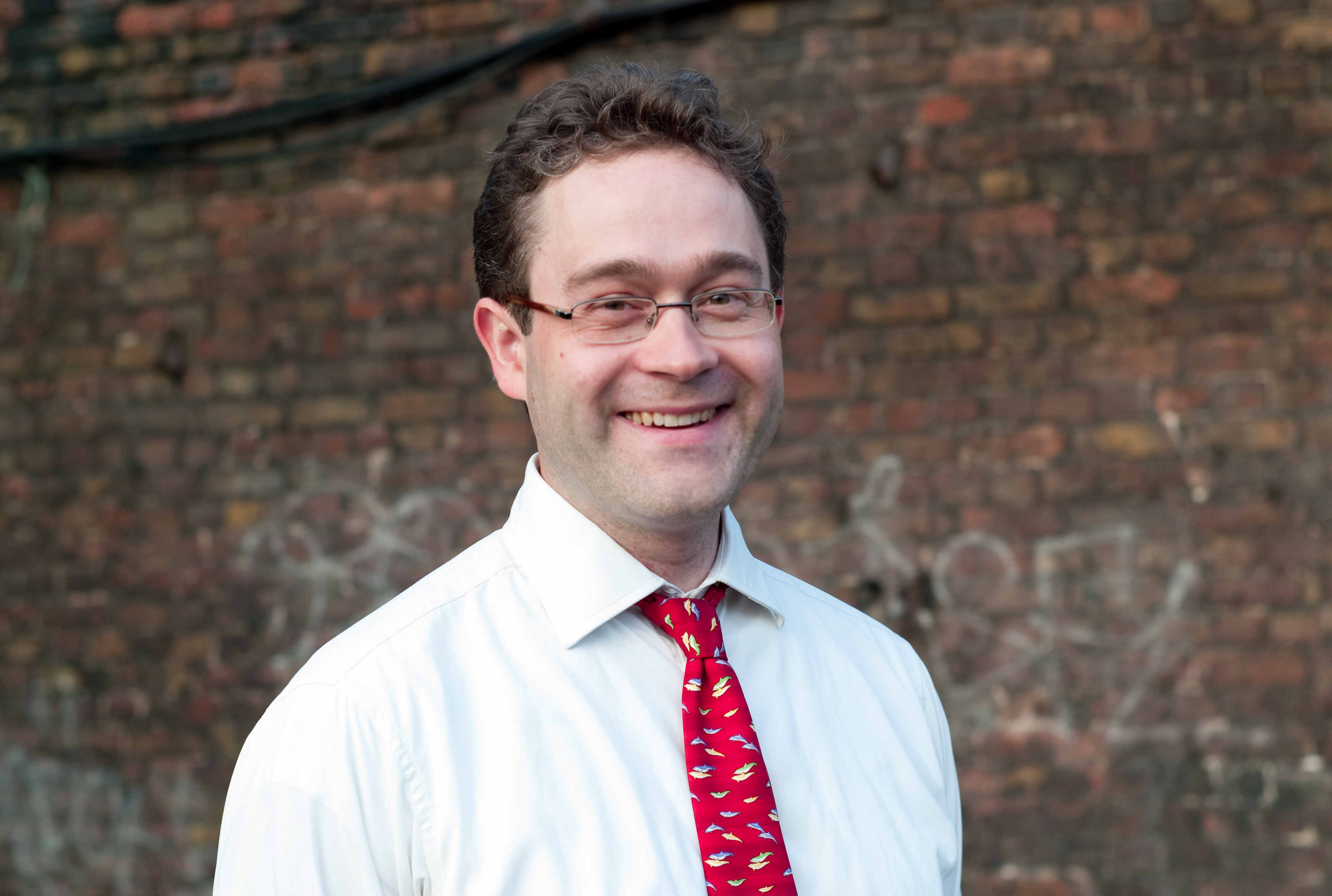 Timo Hannay